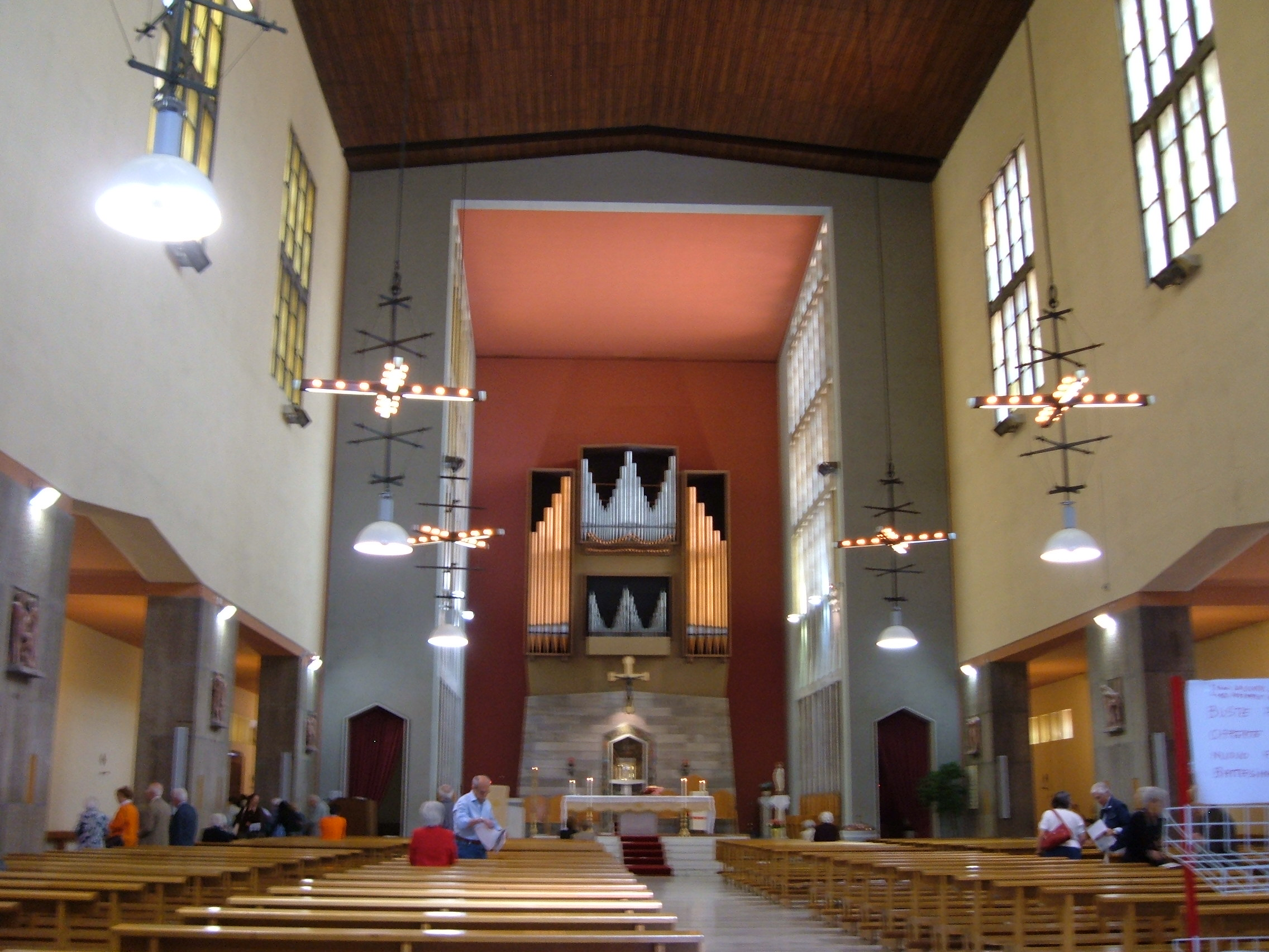 San Pio X (Rome): interno.